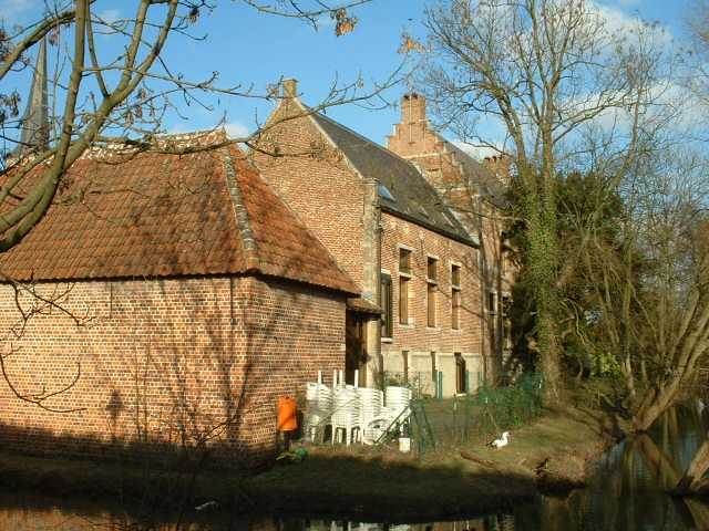 Het gemeenschapcentrum De oude Pastorie uit Nieuwenrode